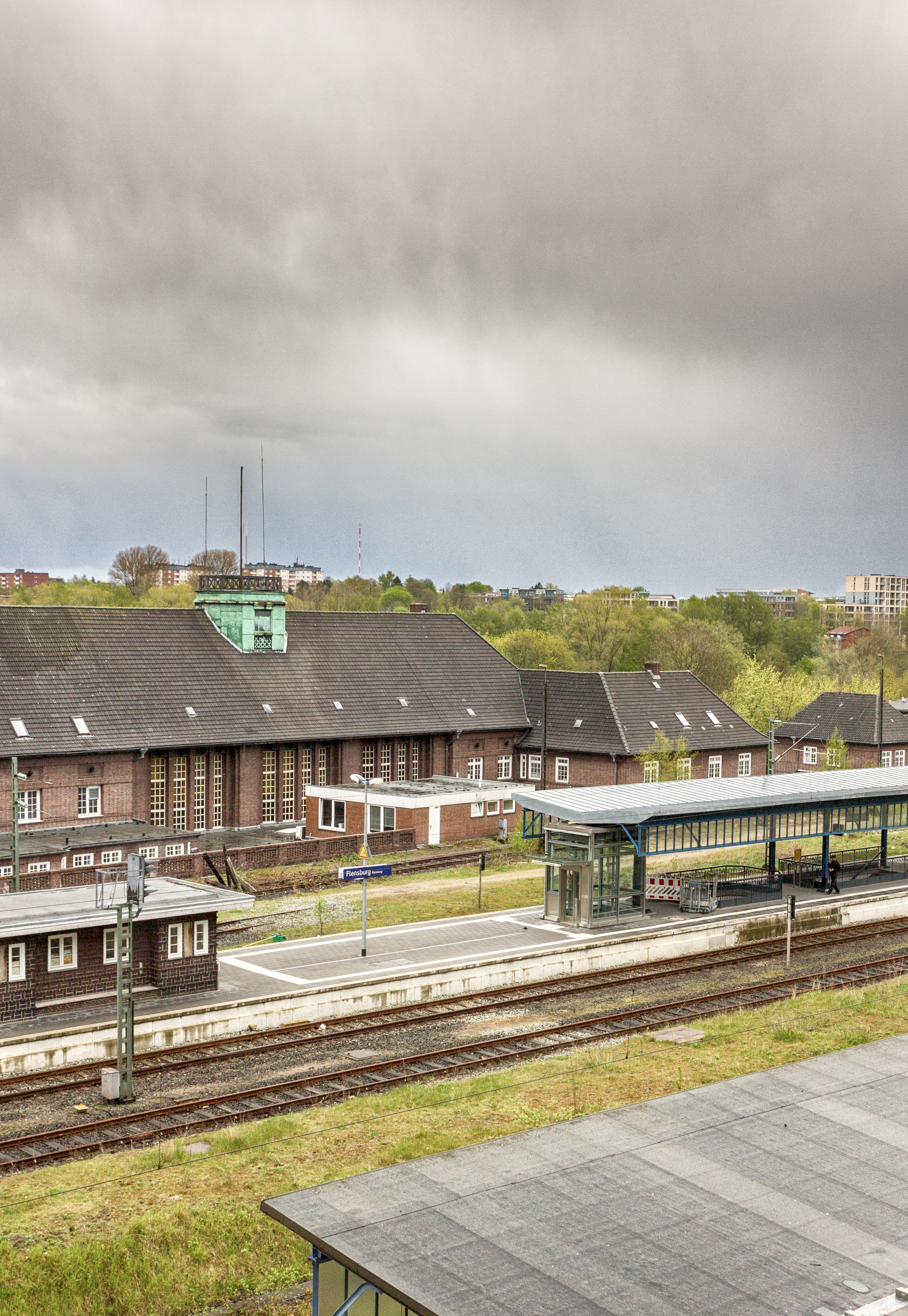 Der Flensburger Bahnhof.